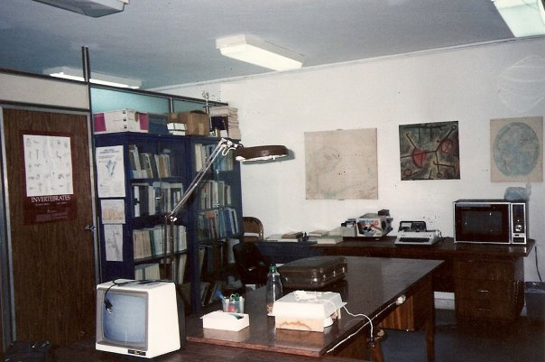 Laboratorio de Biología de Invertebrados del Instituto de Zoología Tropical hacia 1990 Universidad Central de Venezuela - Caracas - Venezuela